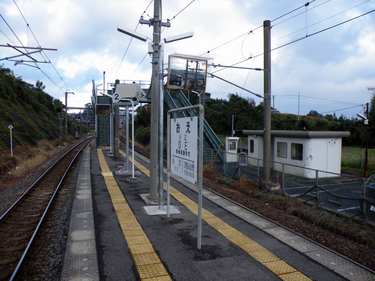 JR九州長崎本線小江駅ホーム